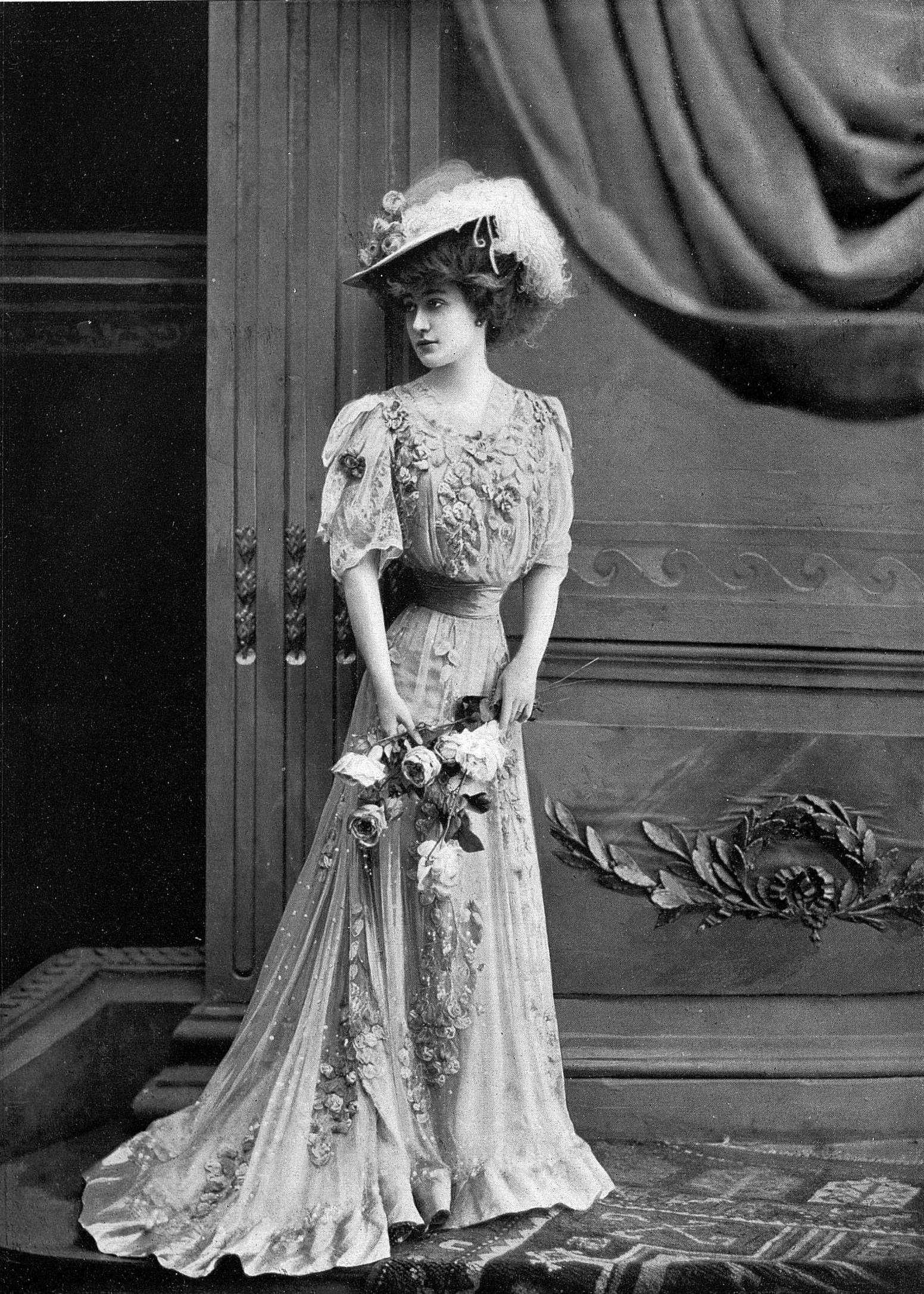 Mlle Fonteney du Théâtre du Gymnase. "Robe en tulle jaune rebrodé de roses de métal or. Grand biais de laine or. Ceinture or." Photograph in Les Modes : Revue mensuelle illustrée des arts décoratifs appliqués à la femme.